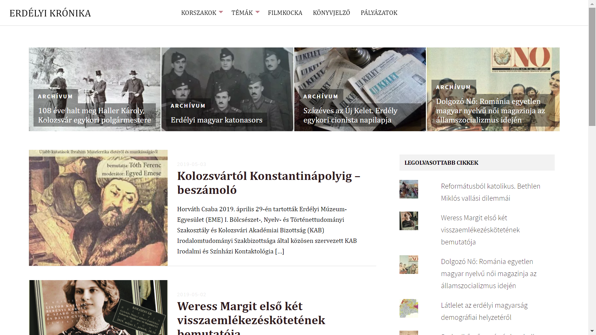 Az Erdélyi Krónika portál arculata